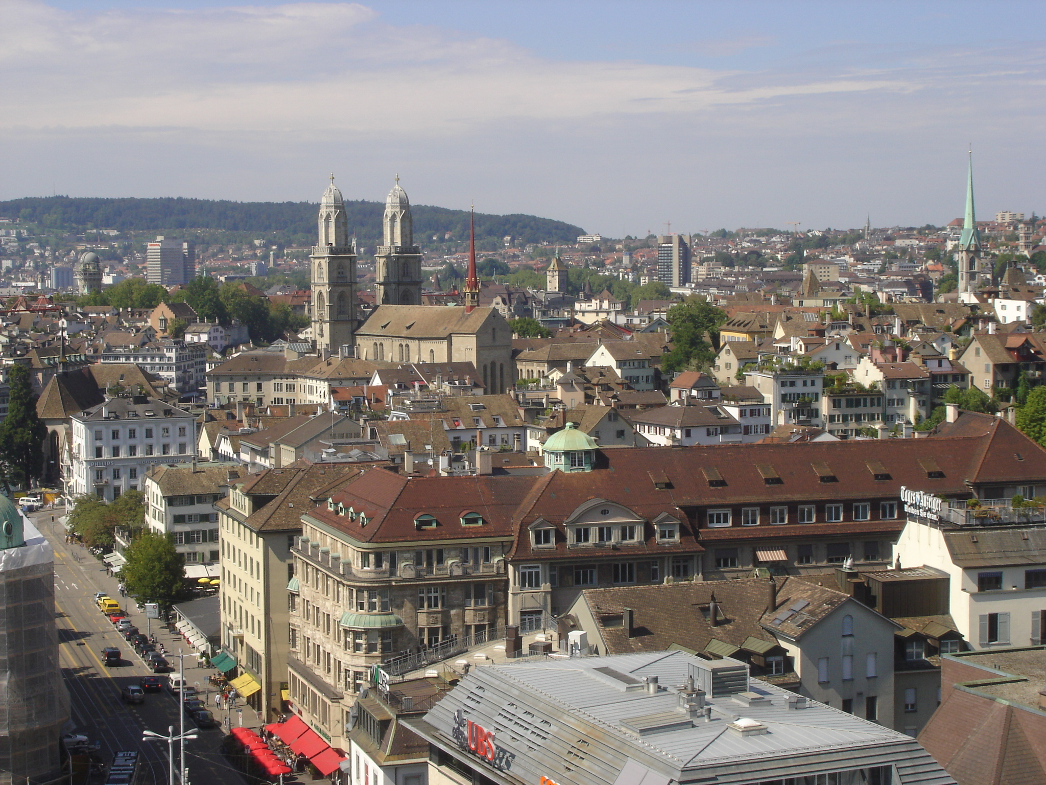 Zurich